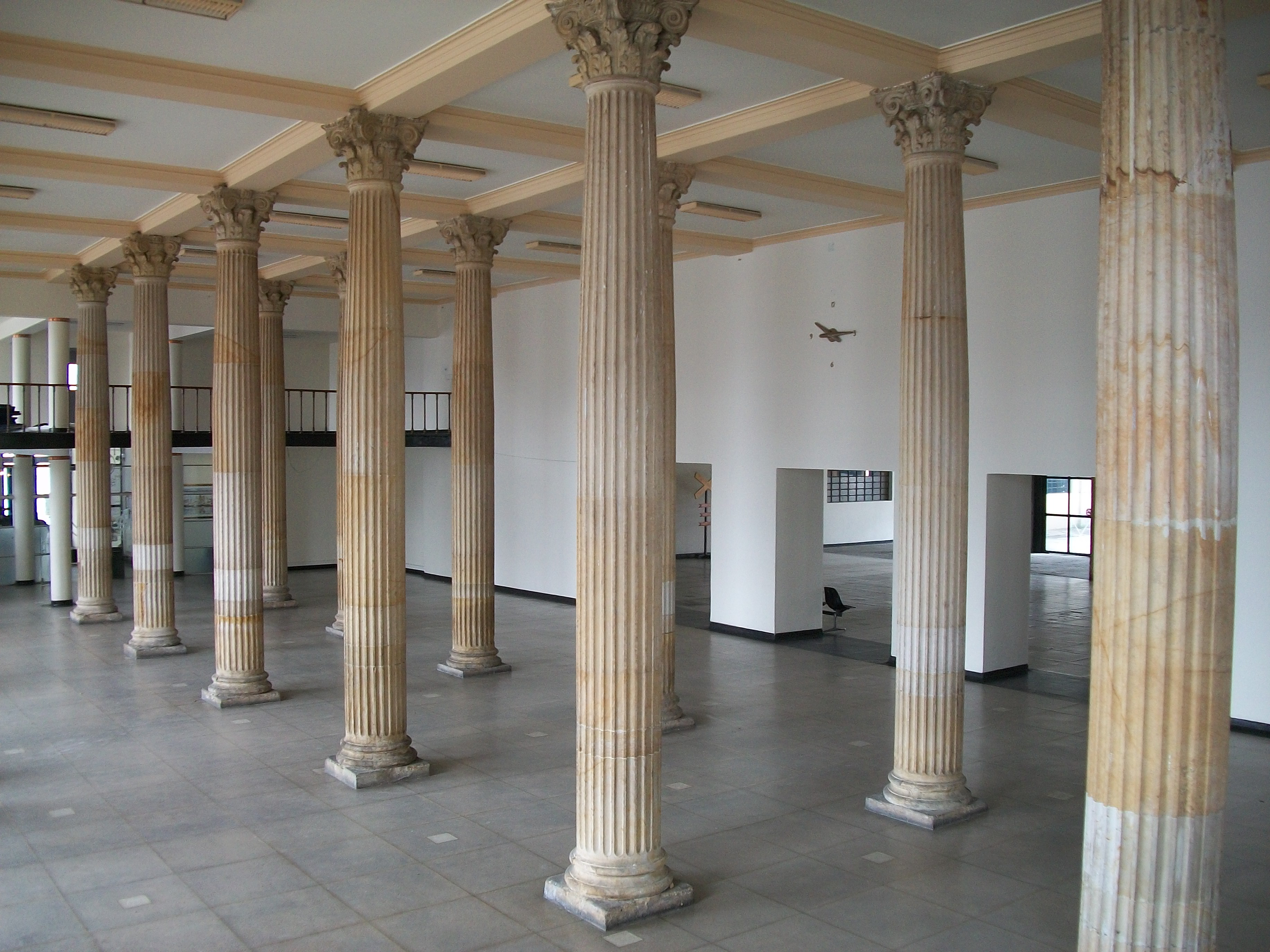 Interior de la estación La Sabana, acceso a los andenes. Bogotá D. C.